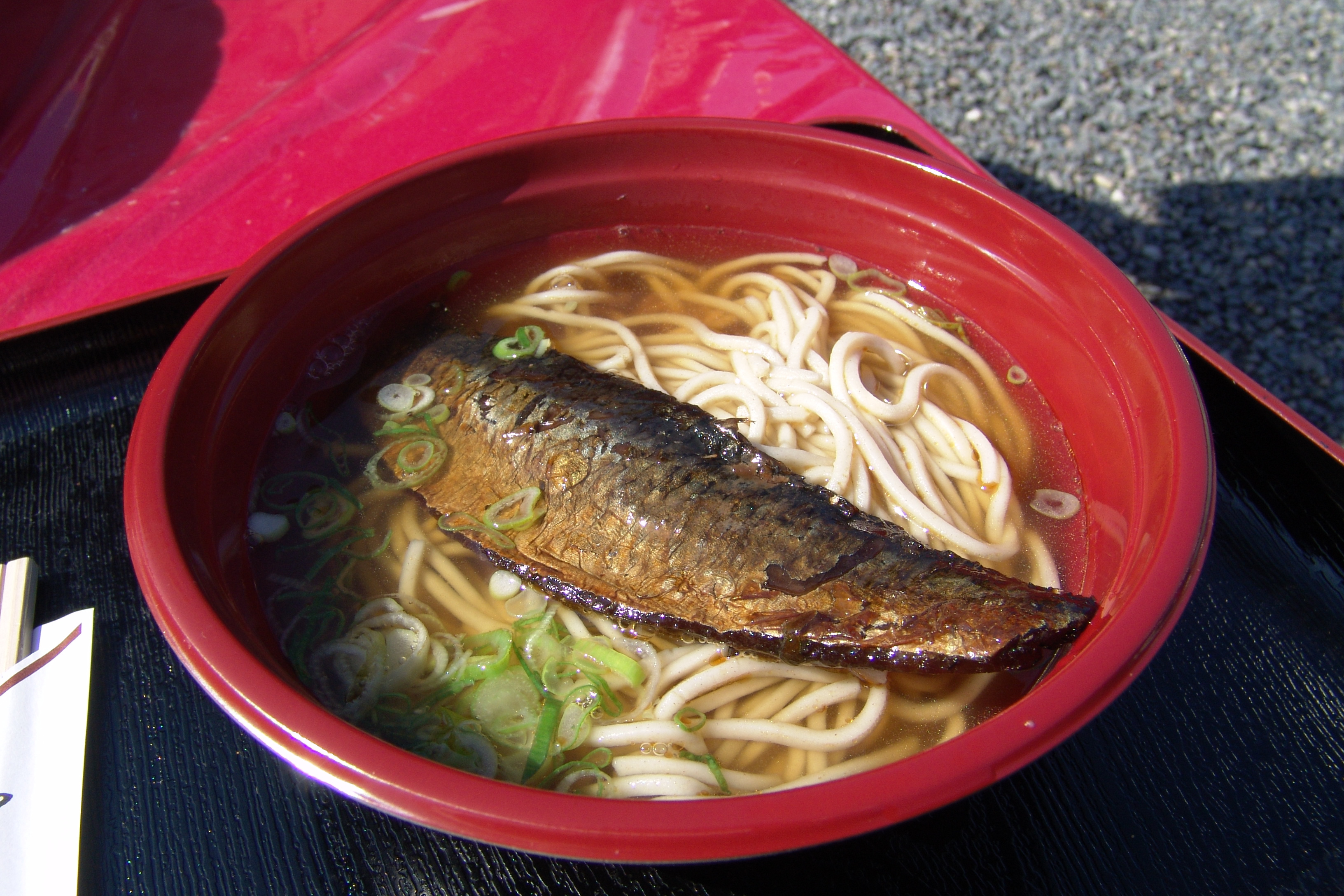 ニシンそば（京都市中京区二条通堀川西入二条城町、元離宮二条城）